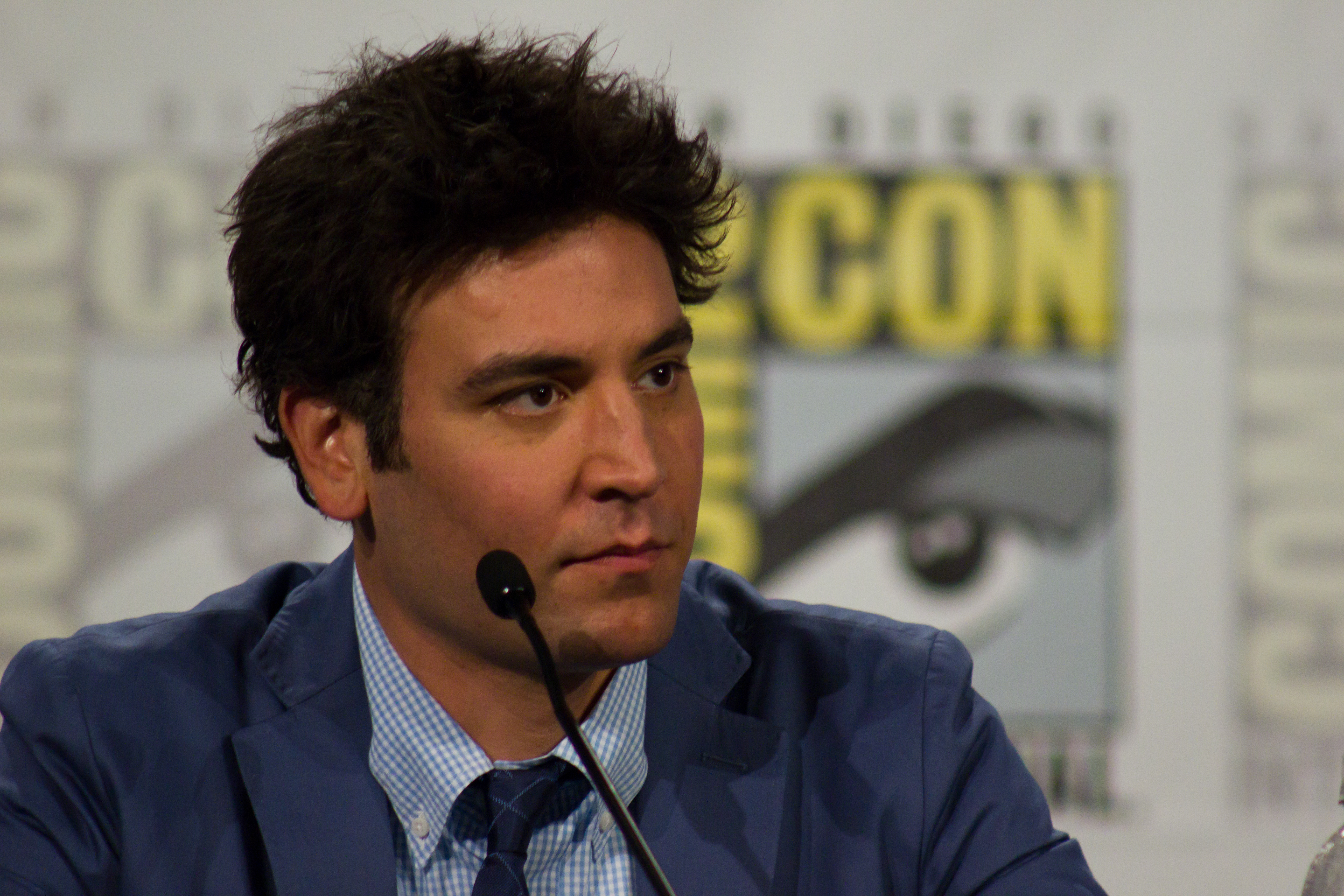 Josh Radnor